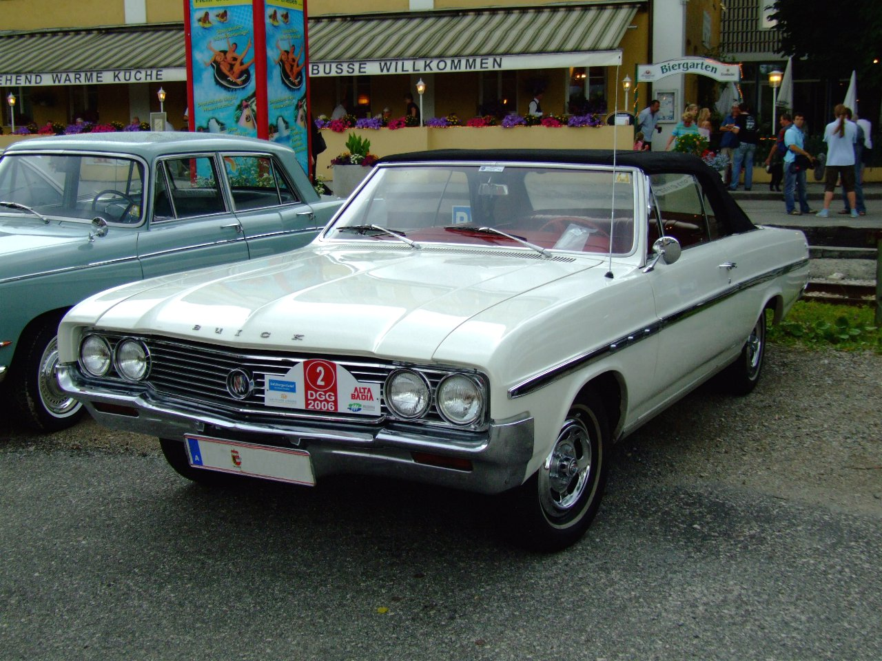 Summary Beschreibung: Buick Skylark Serie 4300 Cabriolet, Modelljahr 1964 Quelle: selbst fotografiert, 06/2006 Fotograf: Späth Chr. Licensing